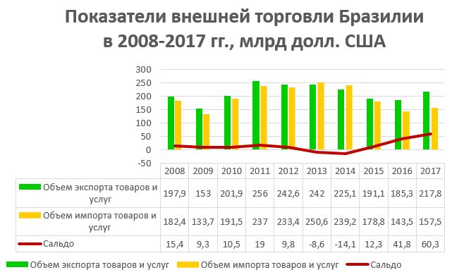 Показатели внешней торговли Бразилии в 2008-2017 гг.